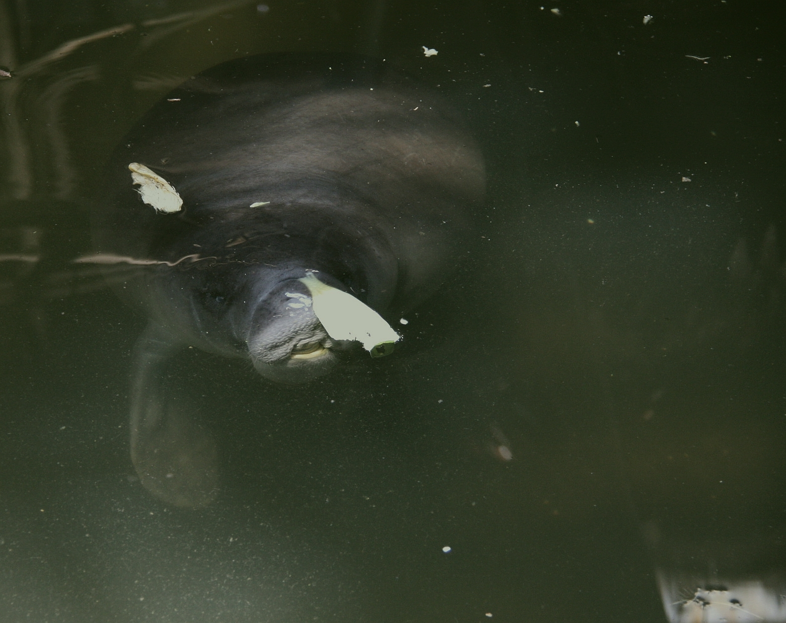 Amazonas Manati (Trichechus inunguis)